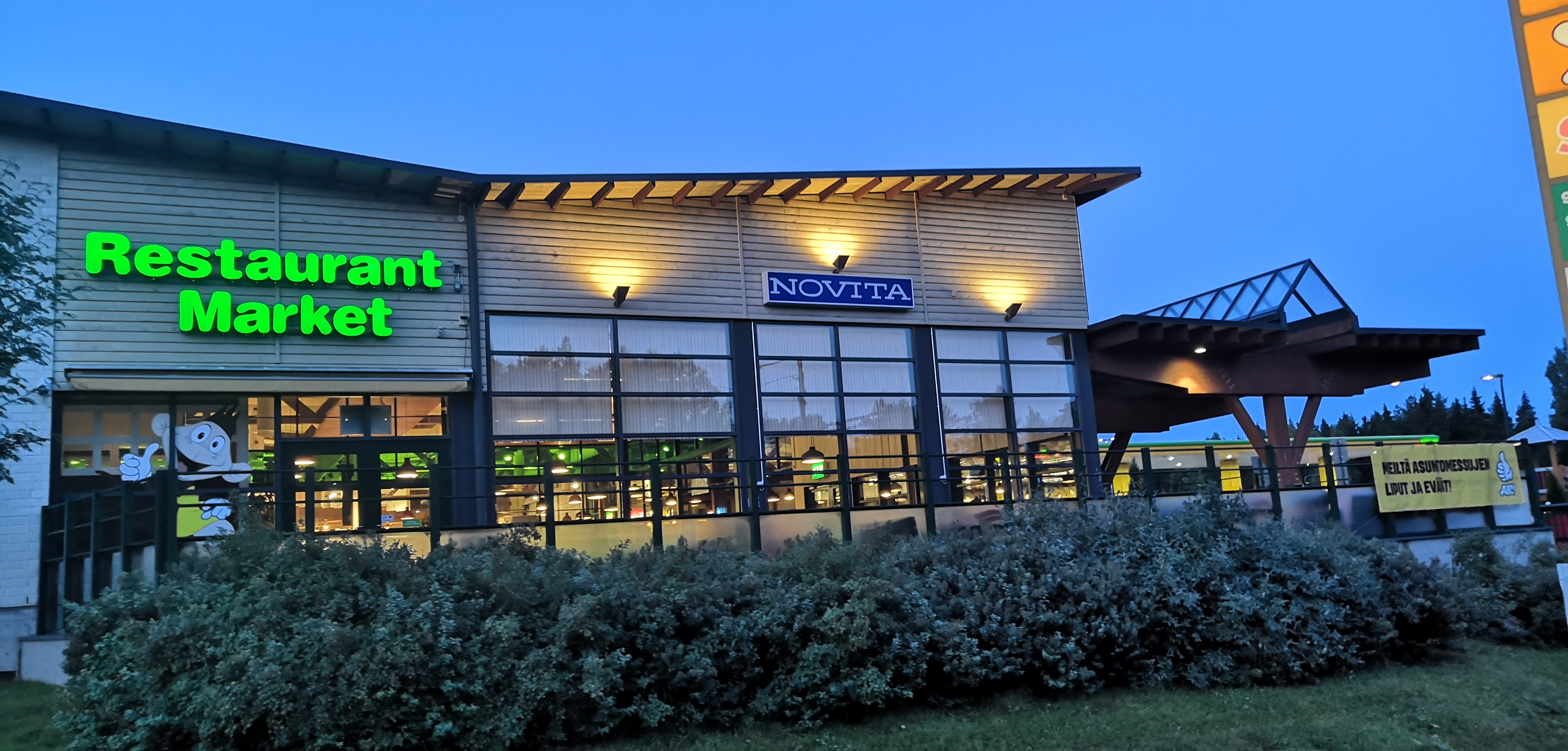 Korian ABC-aseman VT6 puoleinen julkisivu